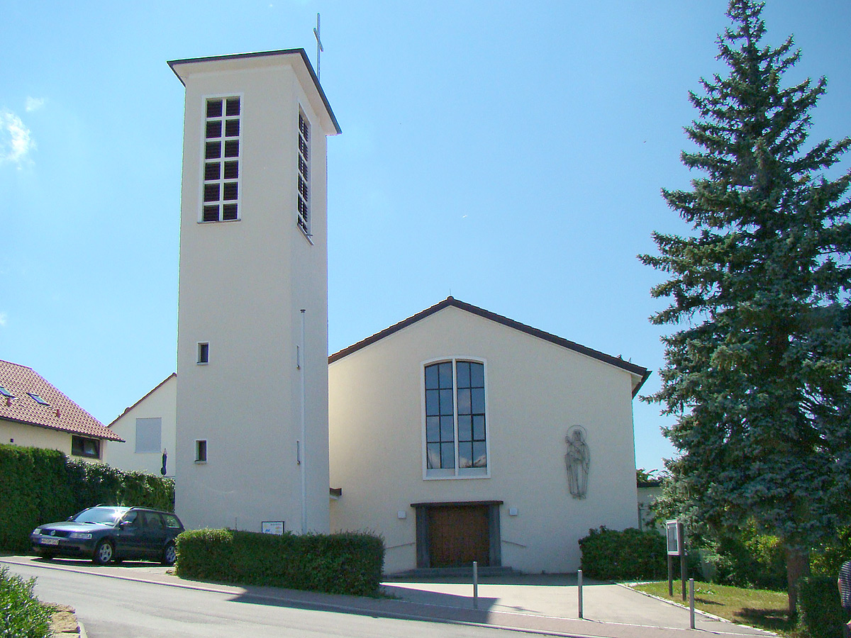 Kath. Kirche St. Lioba in Leingarten